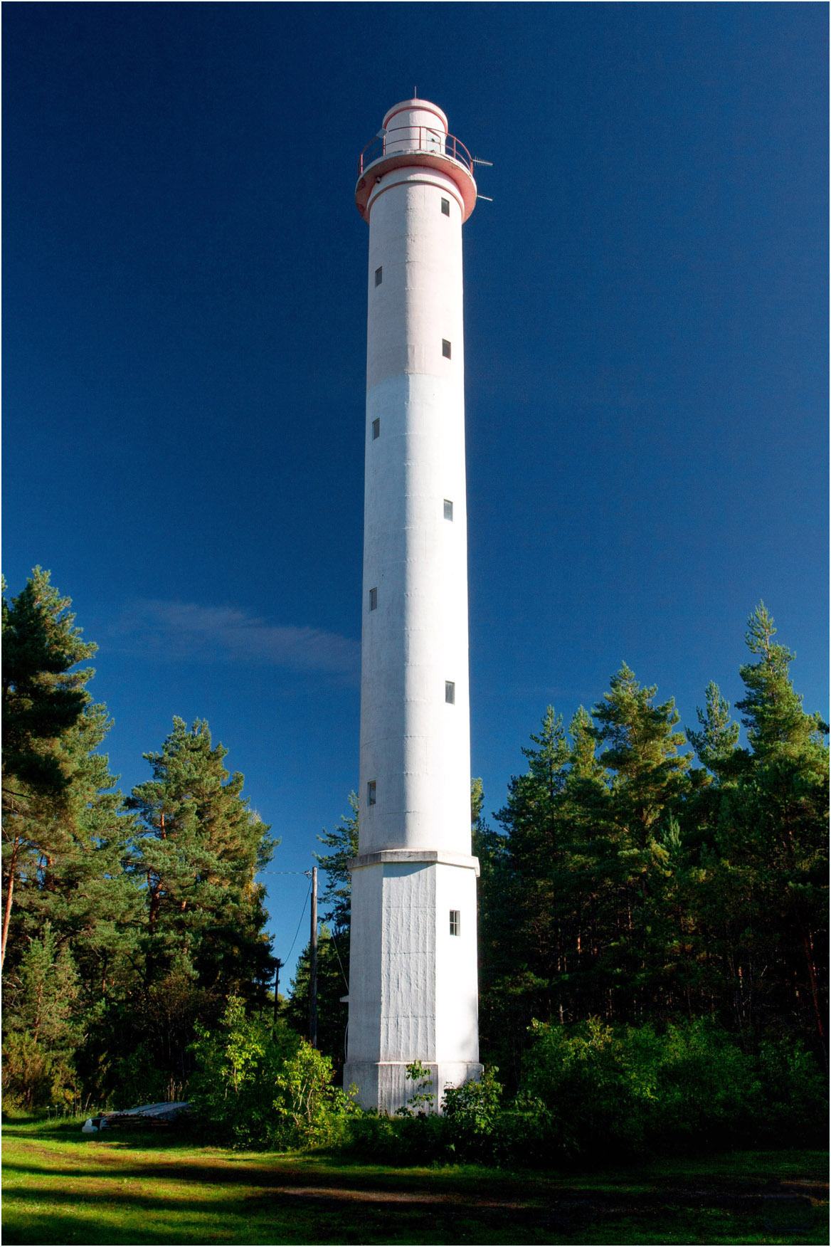 Norrby ülemine tuletorn